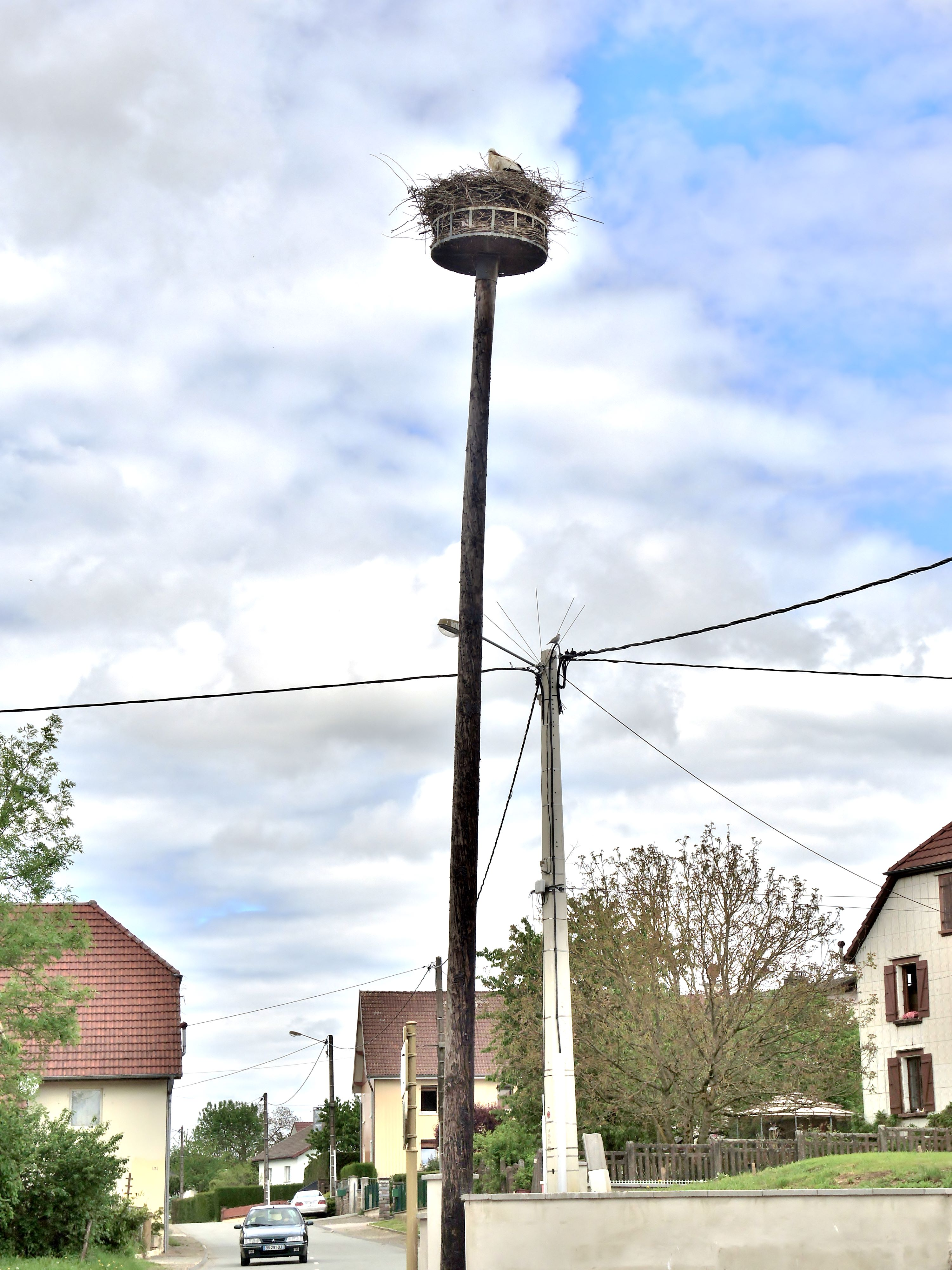 Le nid de cigognes, occupé chaque année, au centre du village de Charmois. Territoire de Belfort